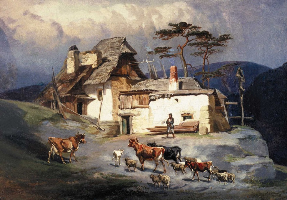 Česky: František Bohumír Zvěřina - Selská chalupa